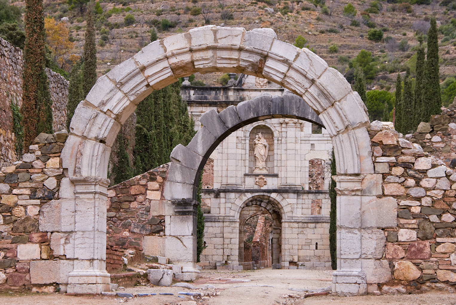 Cartoixa d'Escaladei (La Morera de Montsant)